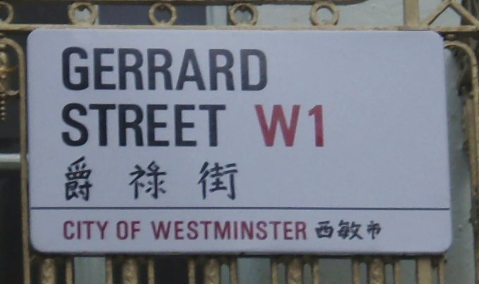 Zweisprachiges Straßenschild in Gerrard Street (Chinatown), London , UK